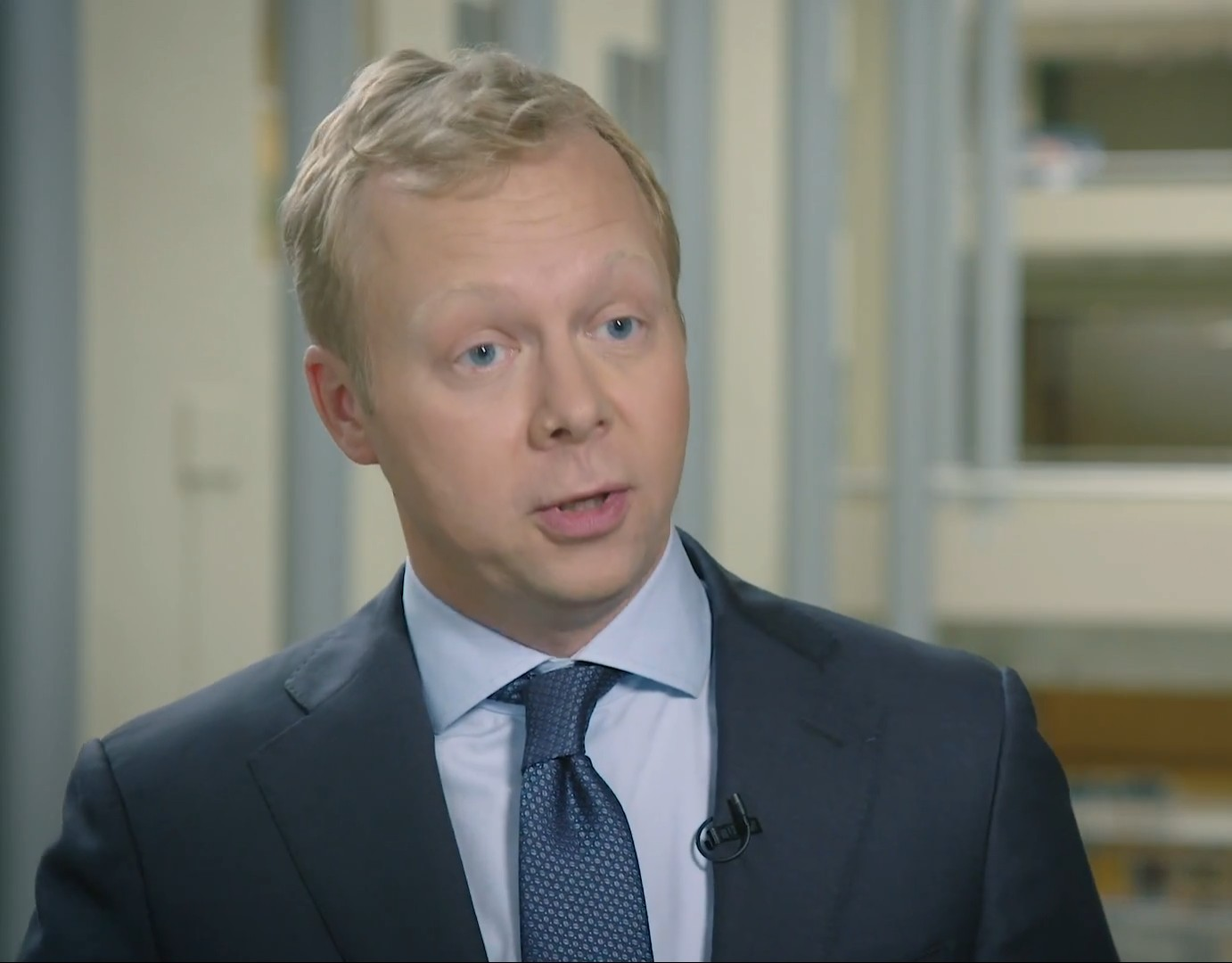 Wat doet de commissie voor de Verzoekschriften en de Burgerinitiatieven? Deze commissie doet onderzoek en verricht voorbereidingen zodat de Kamer een afgewogen beslissing kan nemen over de verschillende verzoekschriften en burgerinitiatieven.